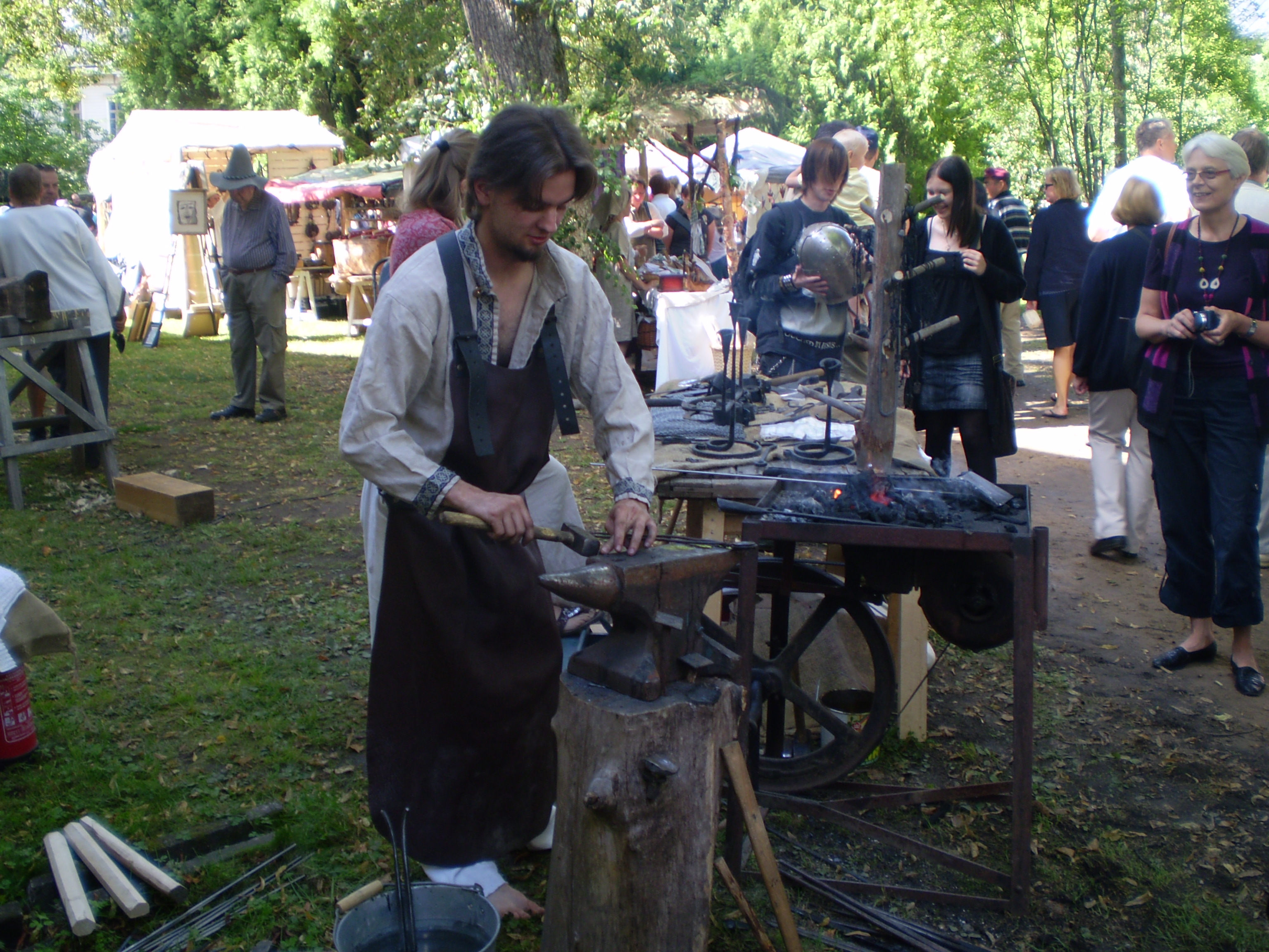 Mustiala Hakkapeliitta tapahtuma